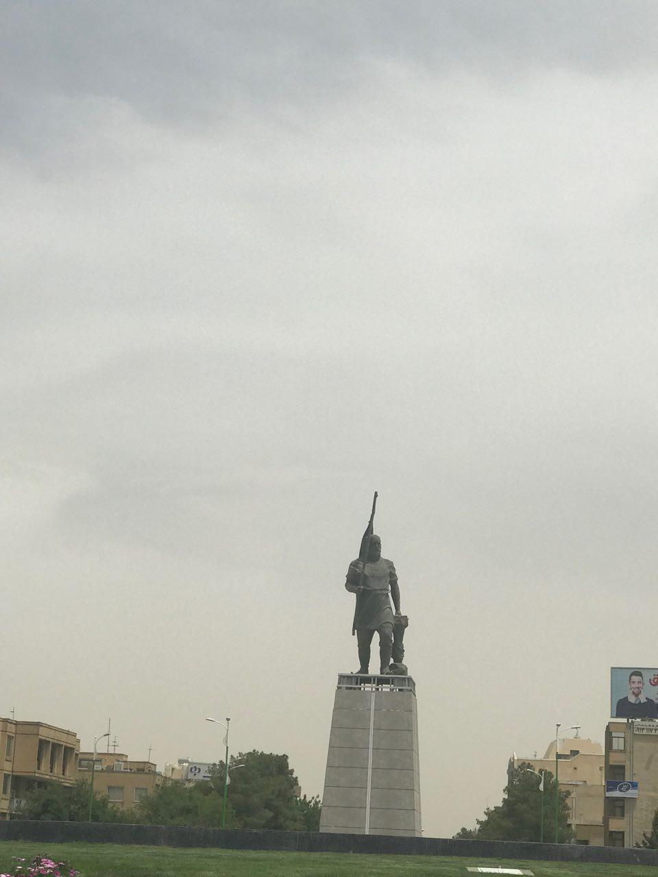 مجسمه کاوه آهنگر، میدان آزادی (دروازه شیراز) اصفهان